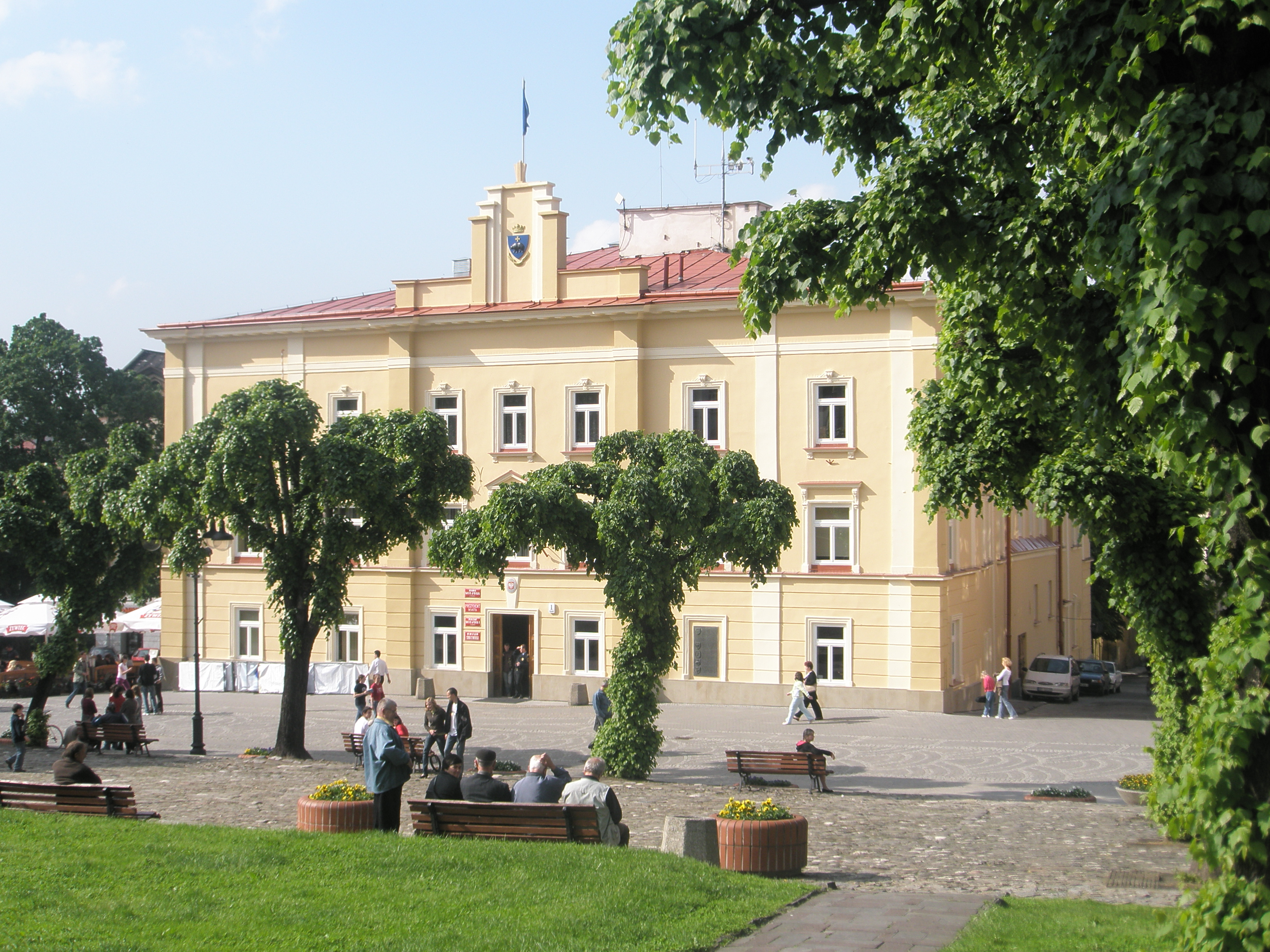 Przemyśl - budynek ratusza na rynku